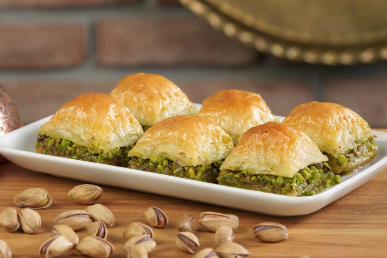 Gaziantep'e Özgü Kare Baklava